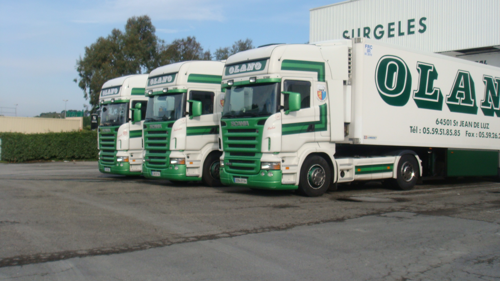 Trois scania du groupe Olano au siège social, à Saint Jean de Luz (64).